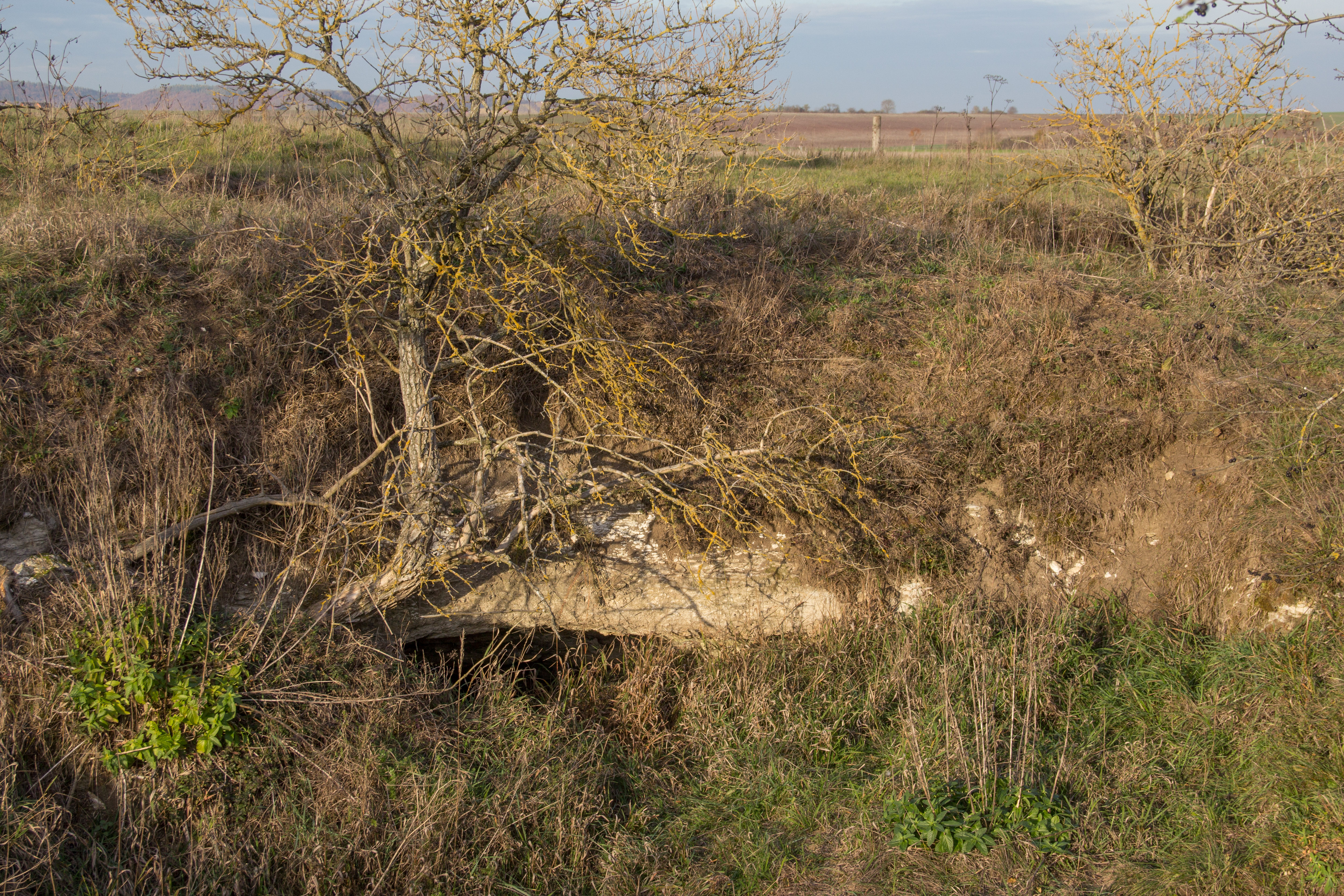 Geotop, Gipshügel Sieben Buckel, Markt Nordheim, Gips